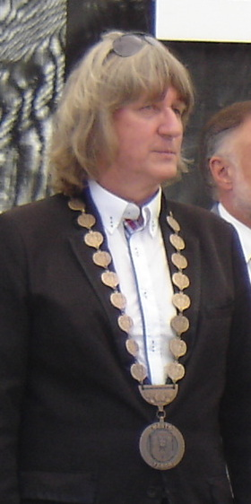 Starosta Tábora Jiří Fišer během návštěvy prezidenta Miloše Zemana v Táboře